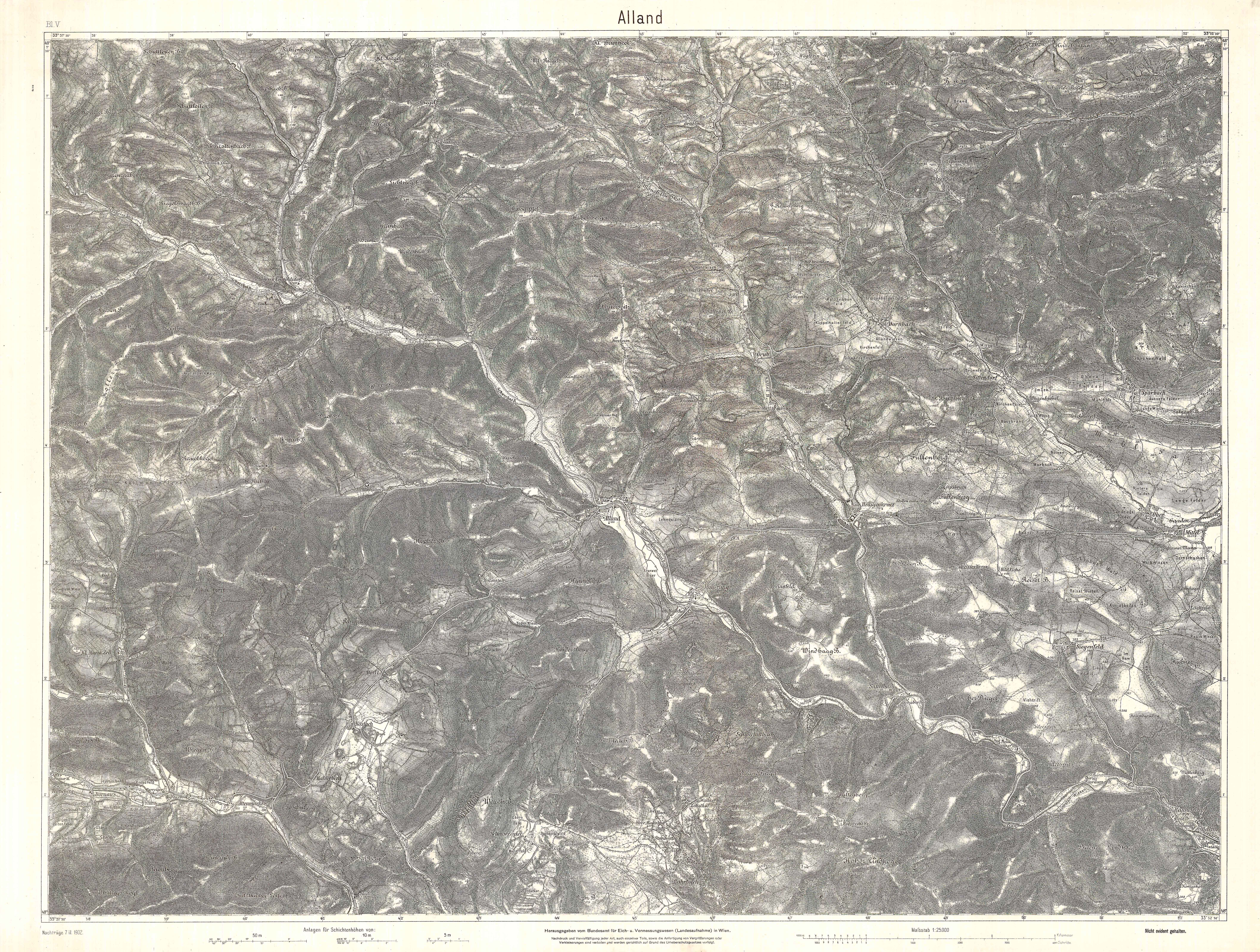 historische Landkarte 1:25.000. Kleinere Datei in 300 dpi, abgemagerte Version. Wienerwald mit Sulz, Klausen-Leopoldsdorf, Mayerling, Sparbach, Sittendorf, Gaaden, Heiligenkreuz, Alland, Klein Mariazell, Hafnerberg, Hoher Lindkogel westlich Baden im Südwesten von Wien